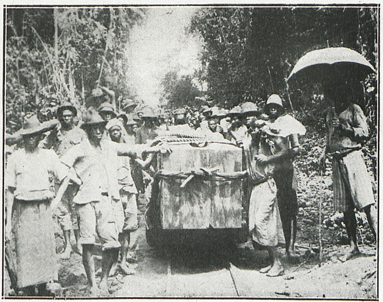 Cameroun - Bille d'Acaju sur wagon Decauville (Photo Agence econ. de Territories sous manaat - Cliche Agence generale des Colonies)